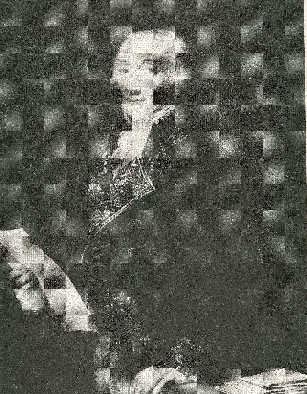 Ritratto di Francesco Melzi d'Eril (1753-1816)